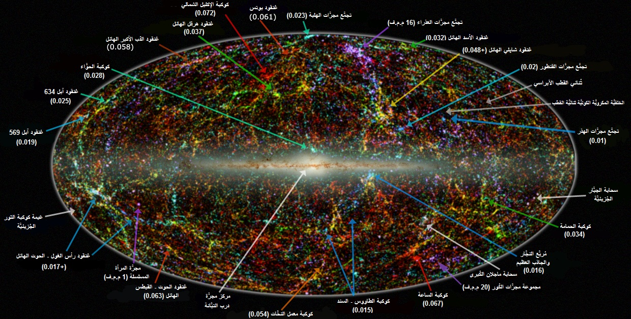 صُورة پانوراميَّة لِكامل السماء شبه ما دون الحمراء تُظهرُ توزُّع المجرَّات ما وراء درب التبَّانة. هذه الصُورة مأخوذة من فهرست مسح كامل السماء ثُنائي الميكرون—وهو يضم أكثر من 1.5 ملايين مجرَّة، وحوالي 0.5 مليار نجم في مجرَّة درب التبَّانة وحدها. تمَّ تلوين المجرَّات باستخدام الانزياح الأحمر (الأعداد مذكورة بين هلالين) وقد تمَّ الحُصول عليها من فهرست أوپسالا العام، ومركز هارفارد-سميثونيان للفيزياء الفلكية، وغيرها من المصادر.